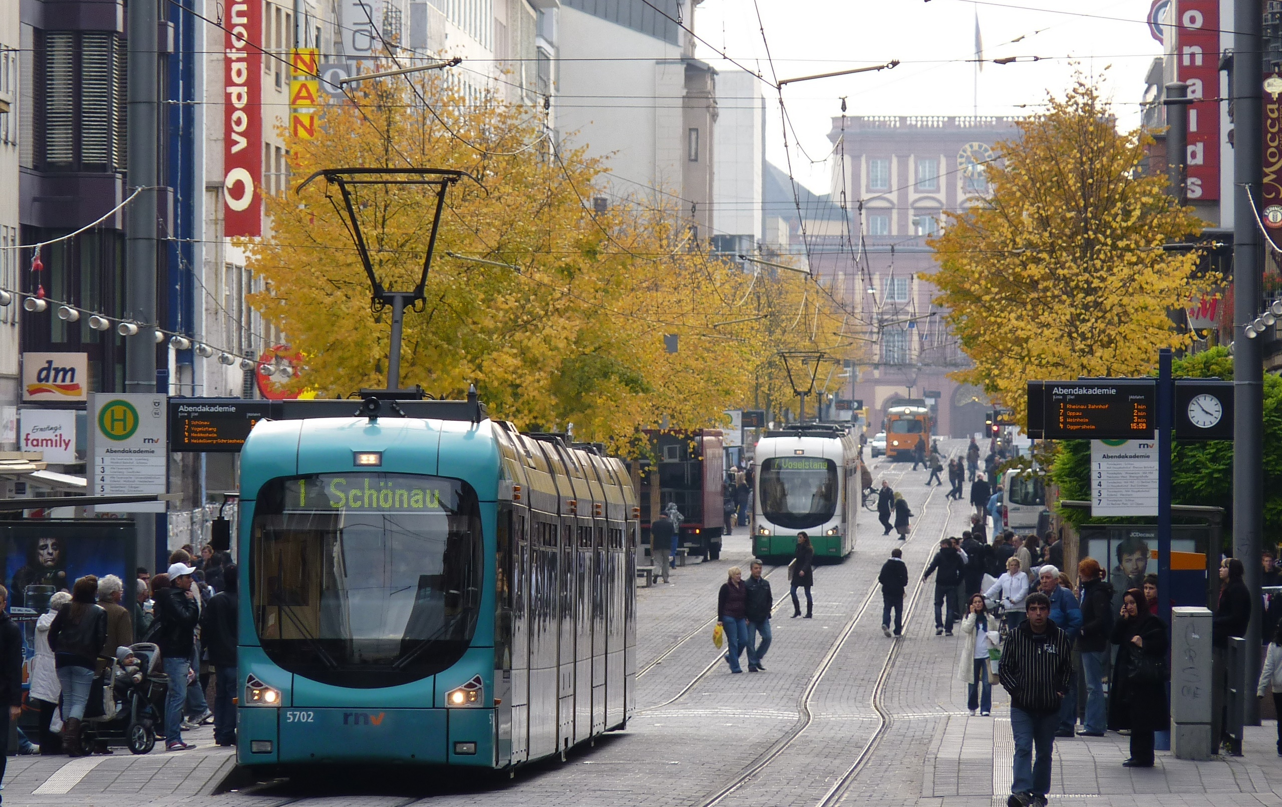 Blick entlang der Kurpfalzstraße in Mannheim, Blickrichtung Schloss. Zu sehen sind je ein Straßenbahnfahrzeug aus Mannheim, Ludwigshafen und von der OEG.